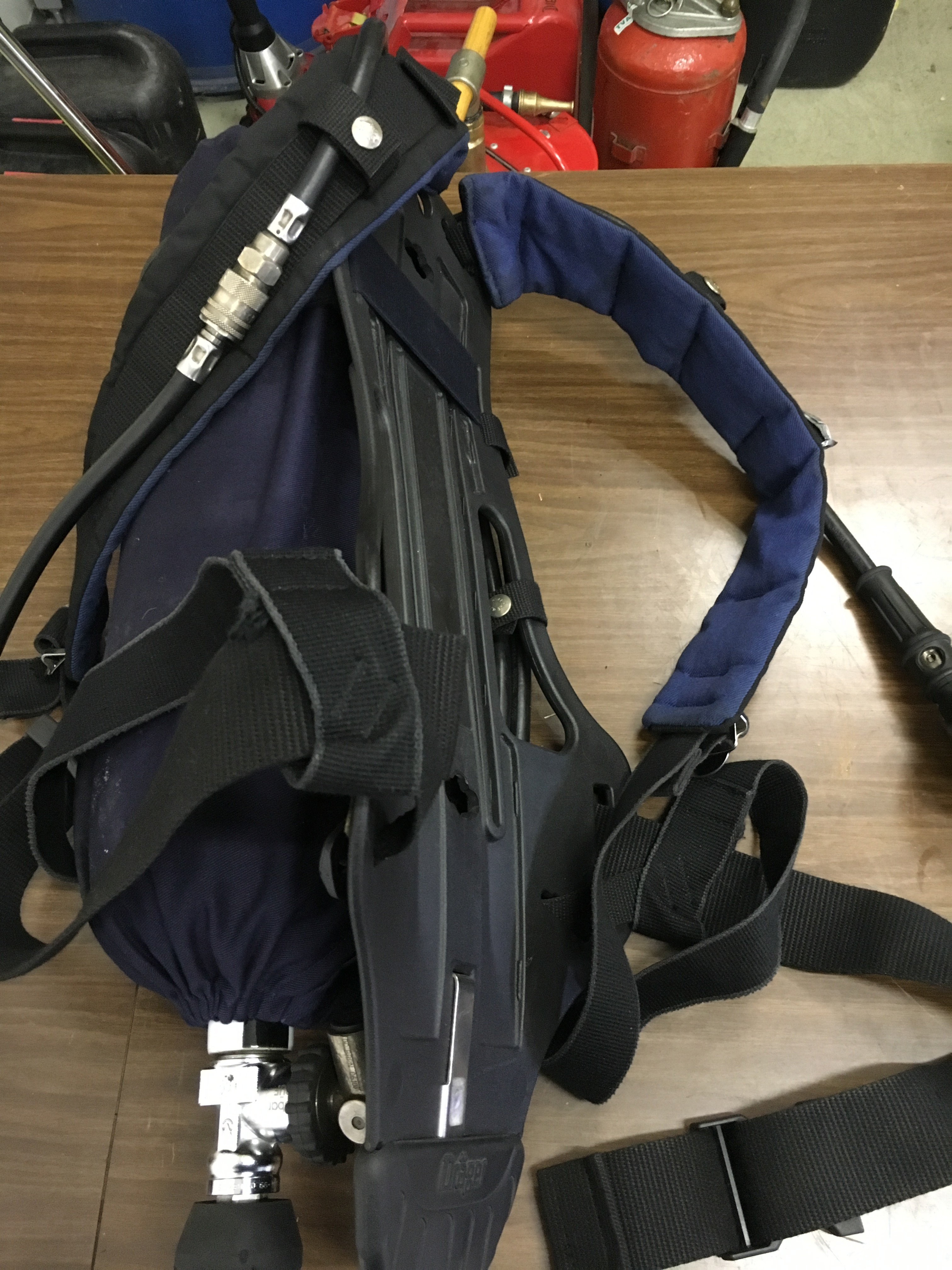 Nosilno ogrodje z naramnicami in trebušnim pasom